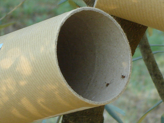 Les insectes, transportés dans des tubes, sont lâchés dans l'oliveraie au petit matin